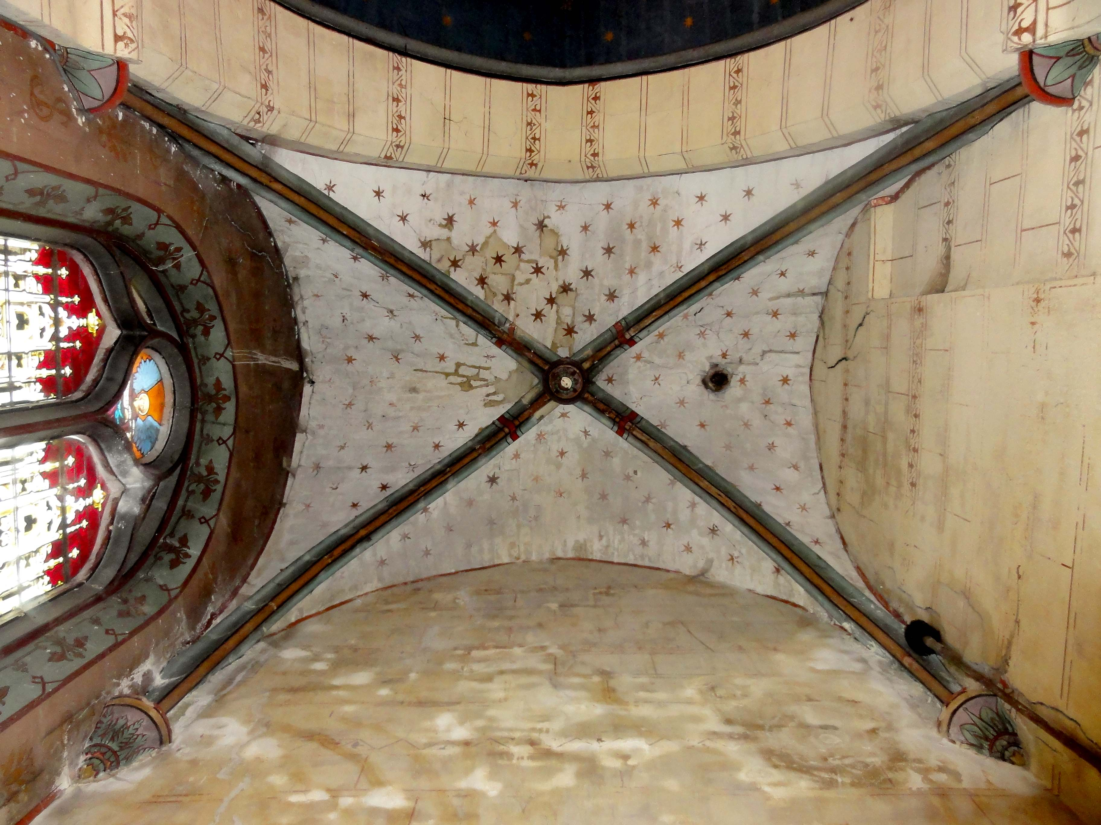 Intérieur de l'église (voir titre du fichier).